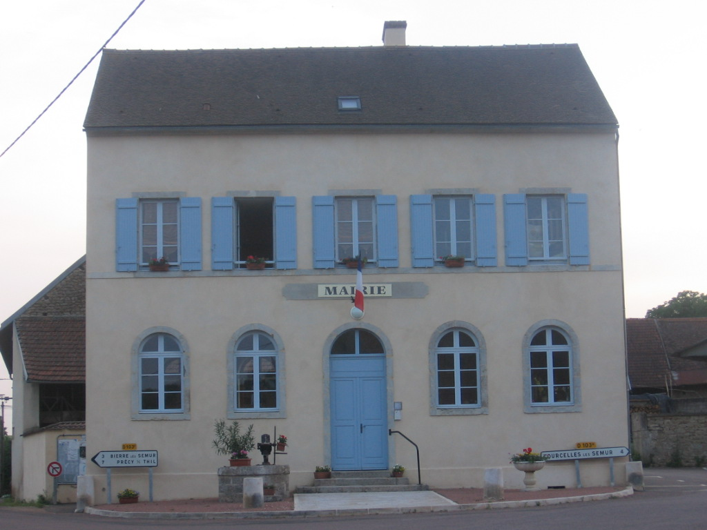 Mairie de Flée (ancienne école)